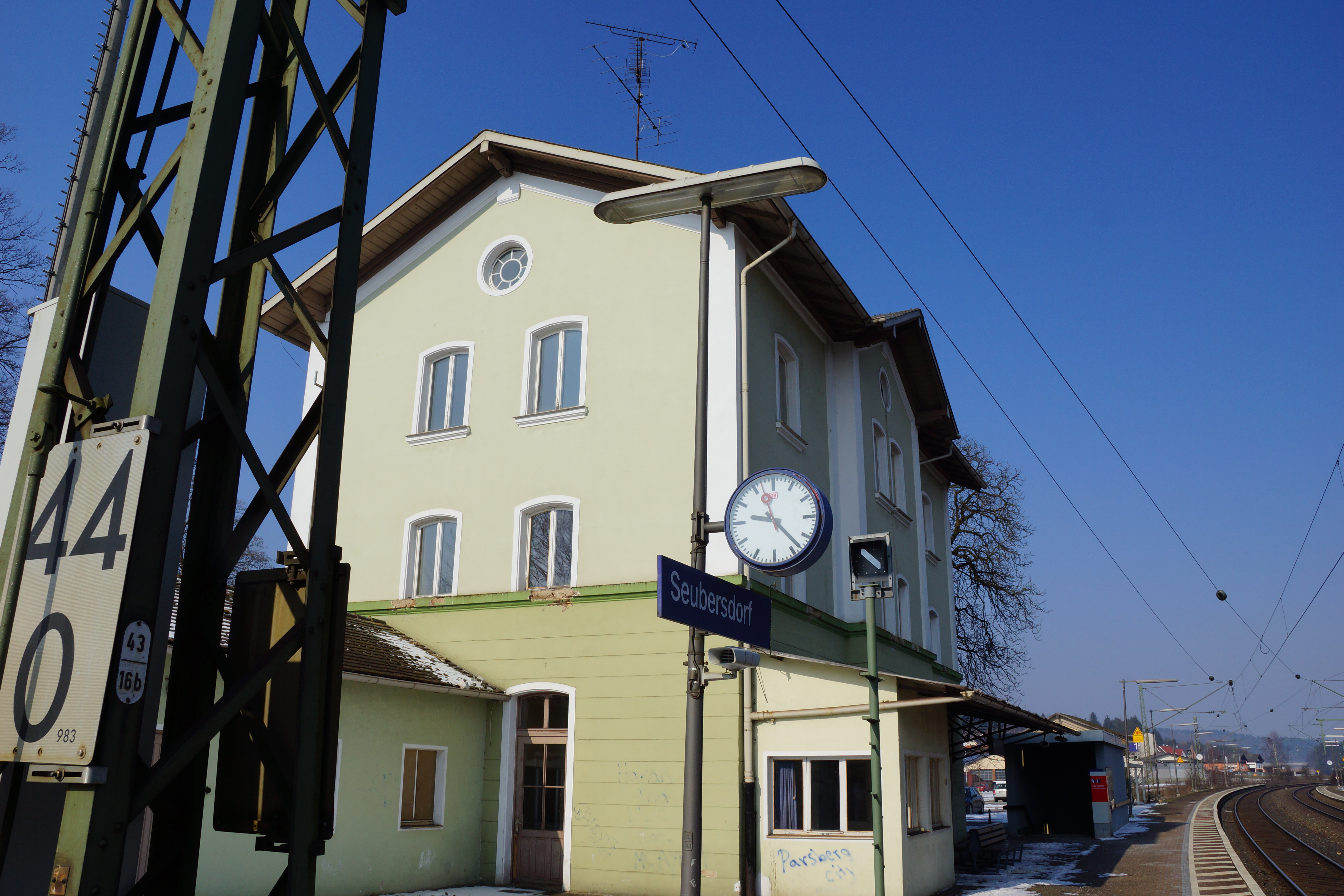 Bahnhof Seubersdorf: Empfangsgebäude und Hausbahnsteig mit Uhr und Fahrtanzeiger.